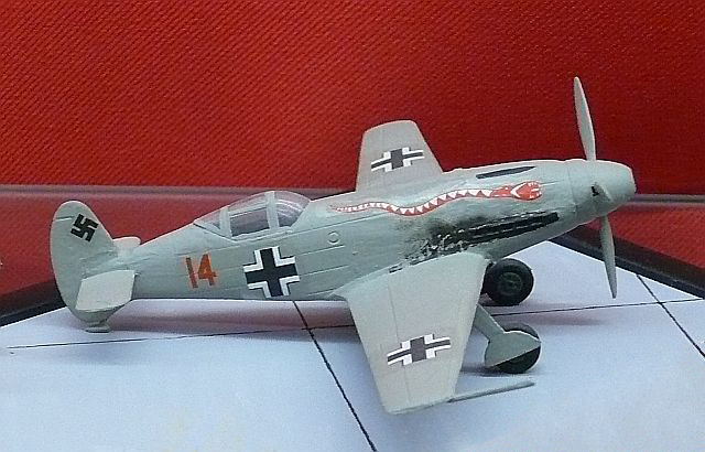 Me 209 V4 Modell, eigenes Bild, This pic must not be used in Germany, since presentation of swastica on a model is forbidden there